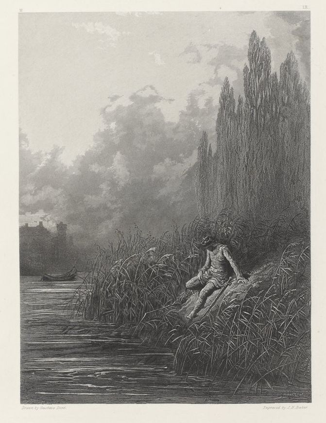 Lancelot ne répondit rien; mais il sortit, et à l'endroit où un petit ruisseau se perdait dans la rivière, il s'assit dans une anse et regarda l'eau qui serpentait